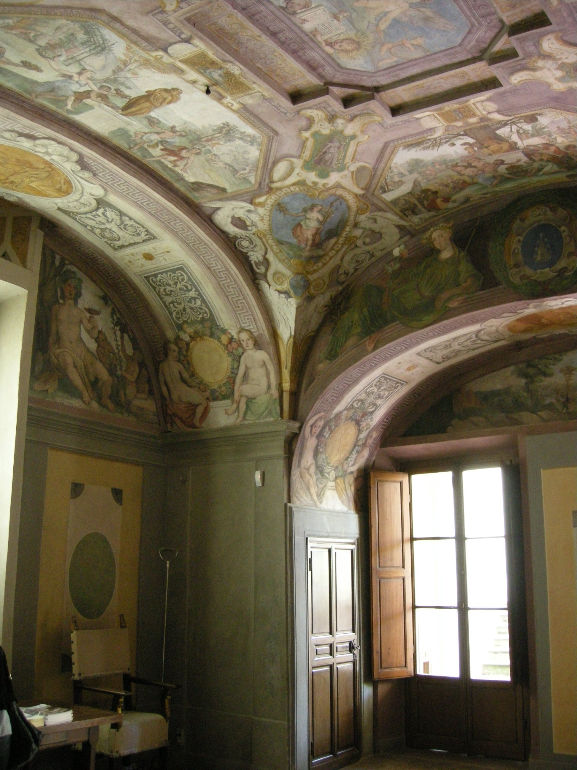 Palazzetto zuccari, affreschi di federico zuccari